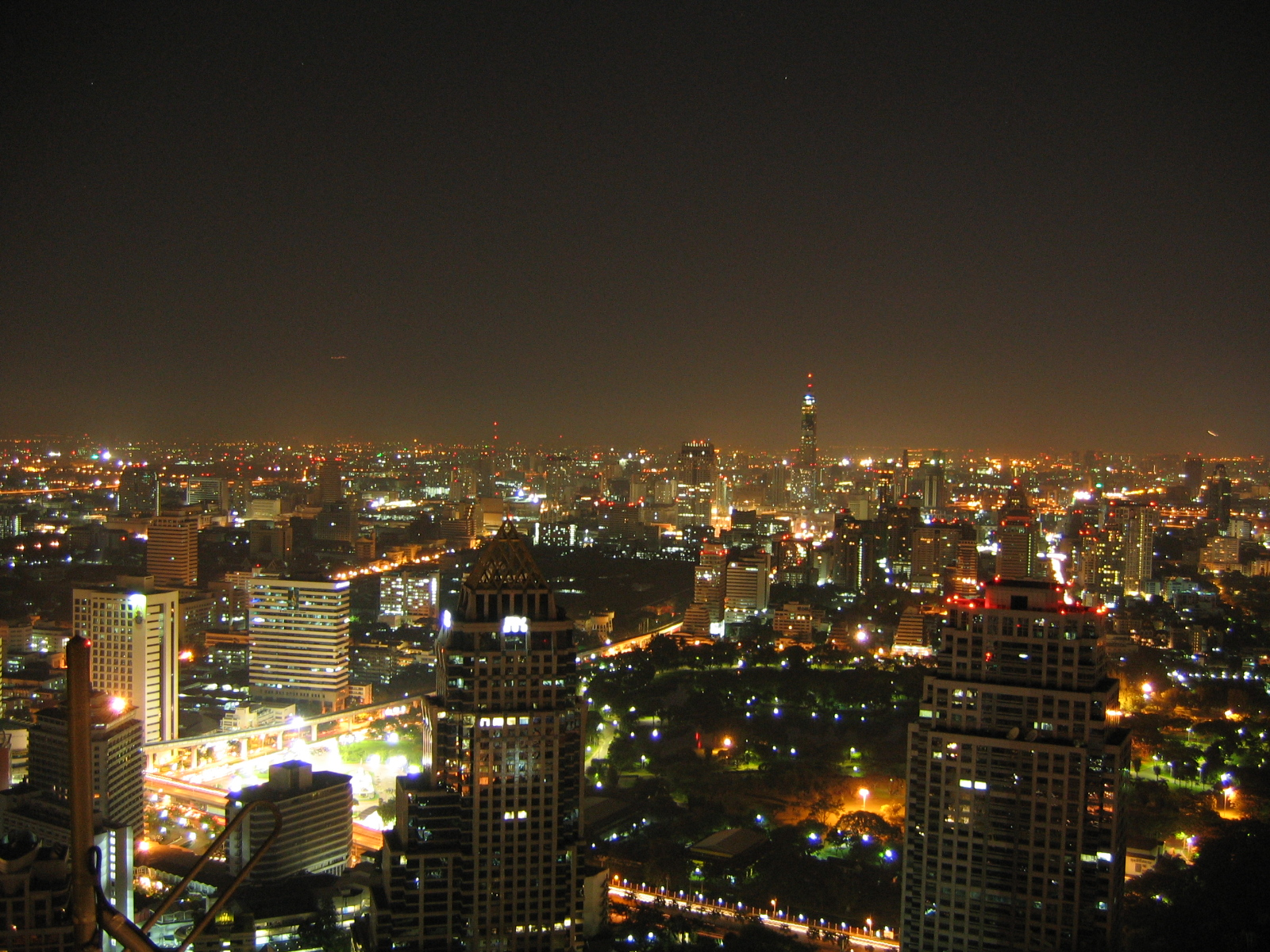 Bangkok nighttime